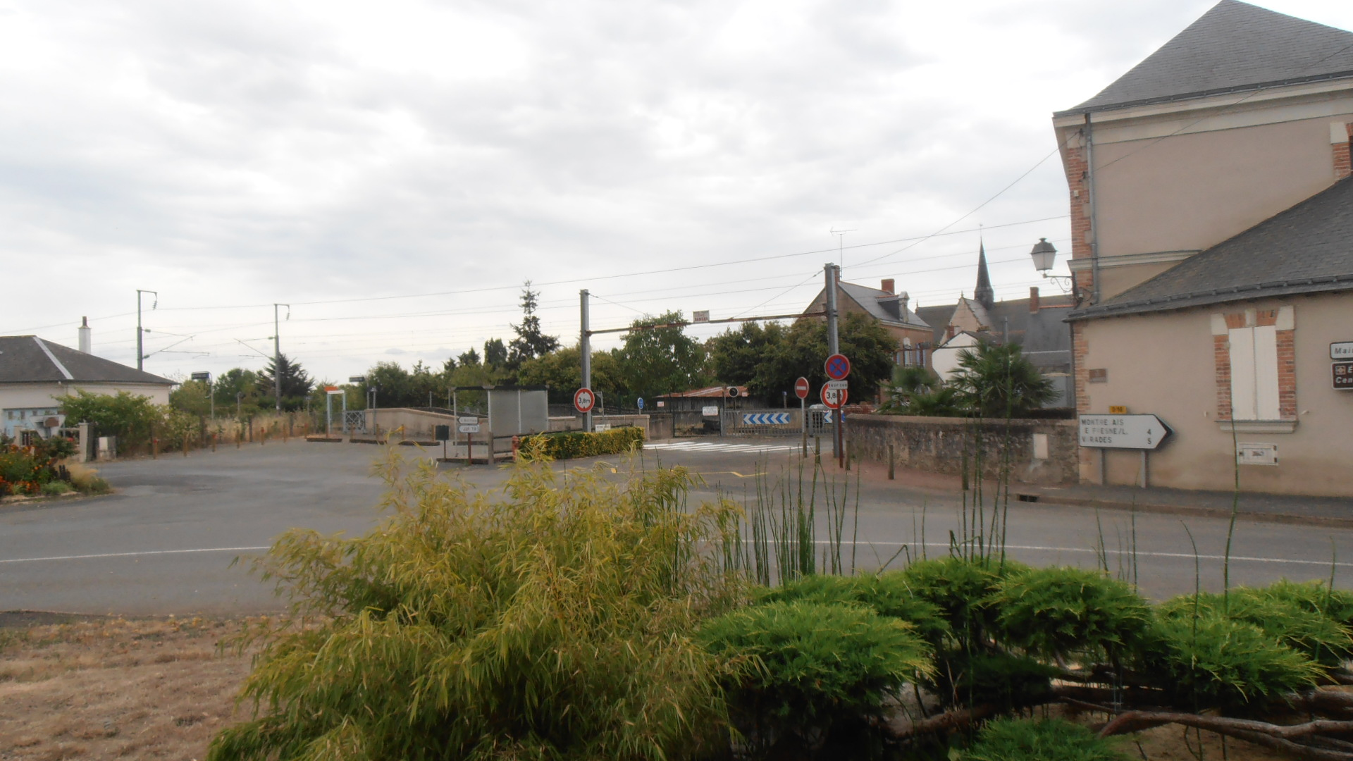 l'ensemble de la gare et du passage au niveau, la gare est bien au centre du village puisque le bâtiment à droite est l'école primaire Joachim du Bellay.